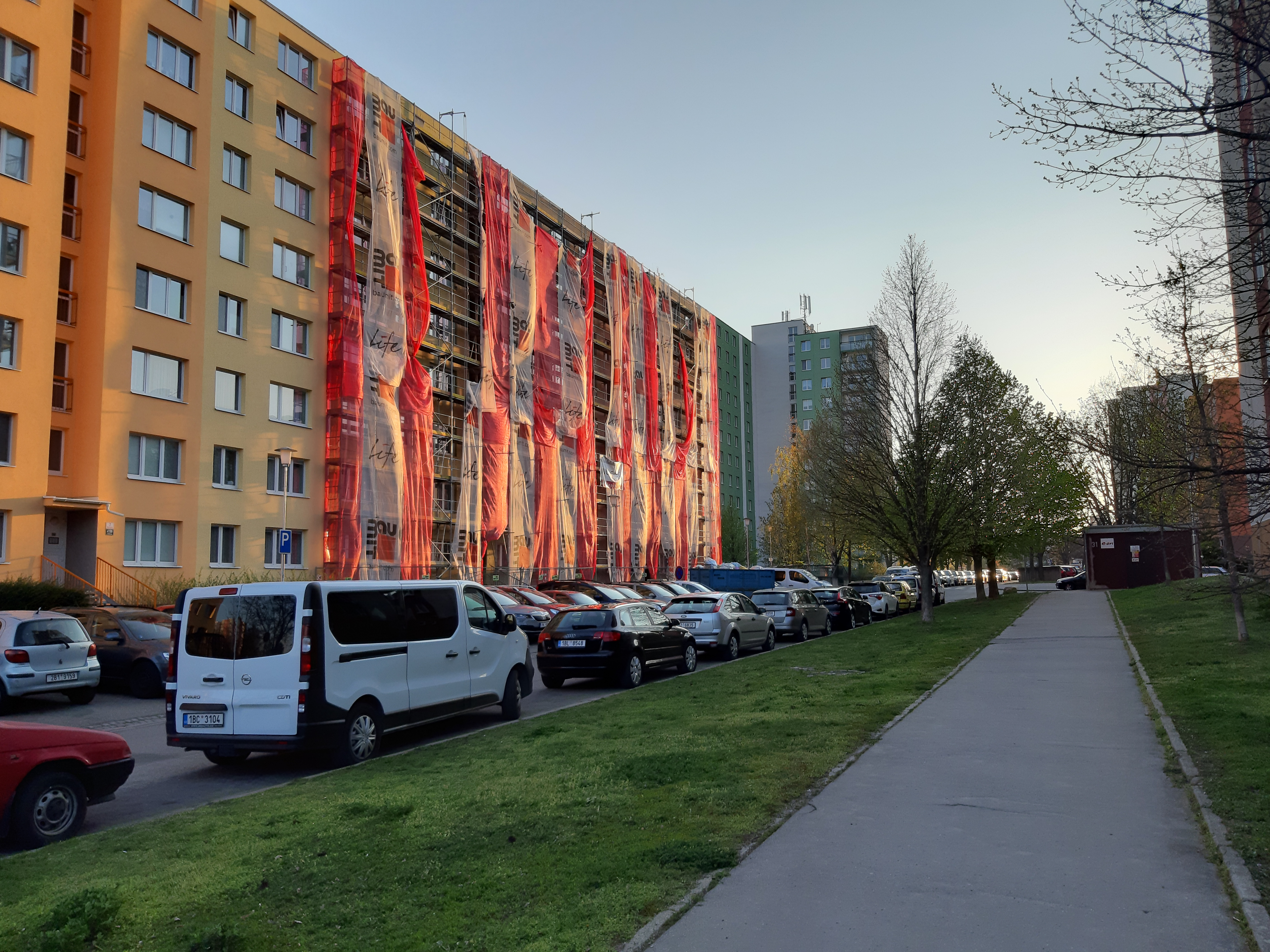 Zateplování panelového domu na Brněnském sídlišti Vinohrady. ֍